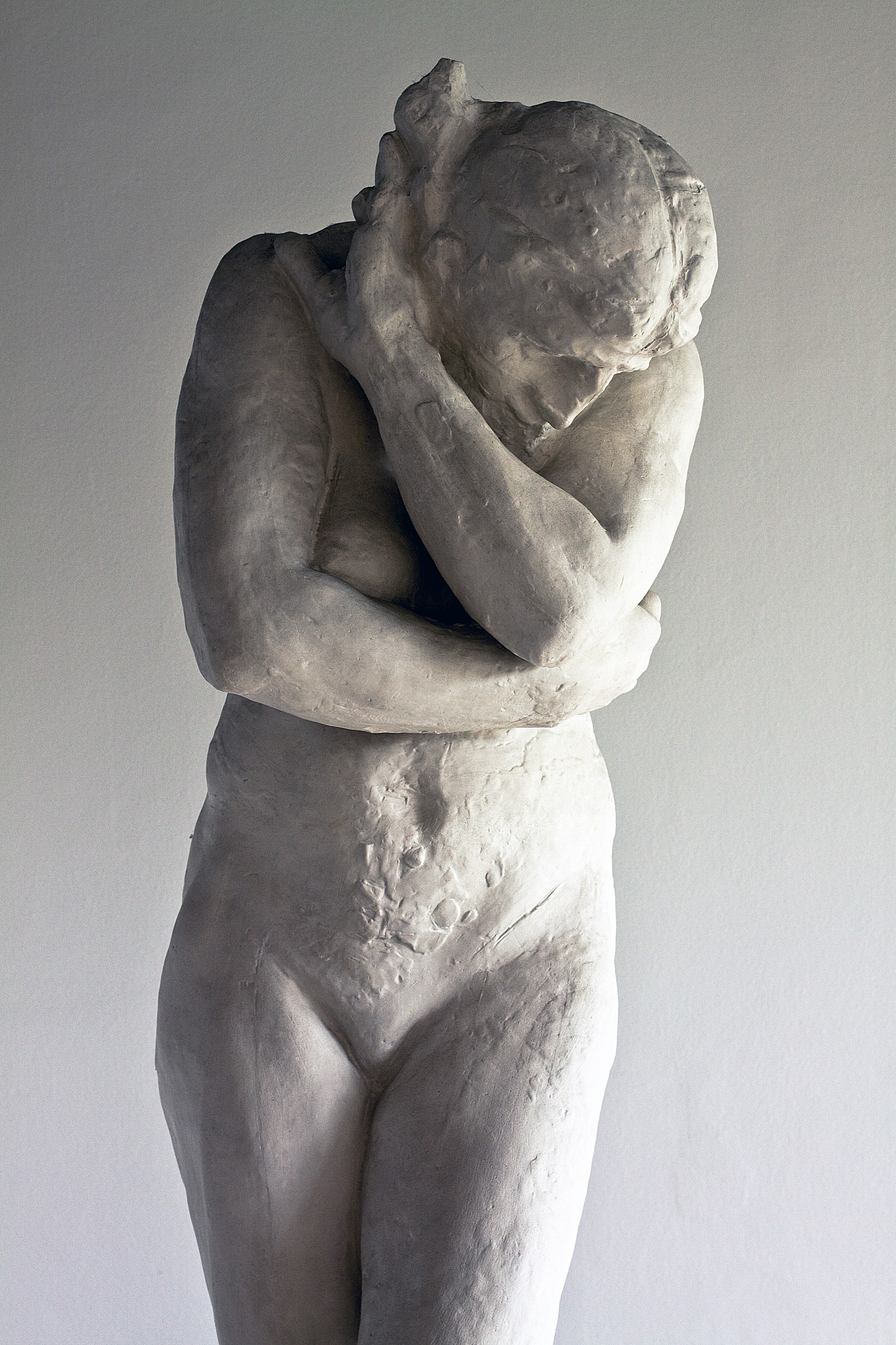 Eva na de zondeval, Rodin (Collectie 15de-17de eeuw, zaal 53) Country: Netherlands City: Rotterdam Location: Museum Boymans van Beuningen Artist: Auguste Rodin Name: Eva na de zondeval, 1881